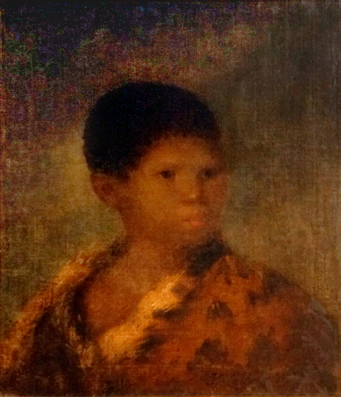 Bernisches Historisches Museum in Bern, Porträt des Südseeinsulaners Taweiharooa gemalt von John Webber, 1793